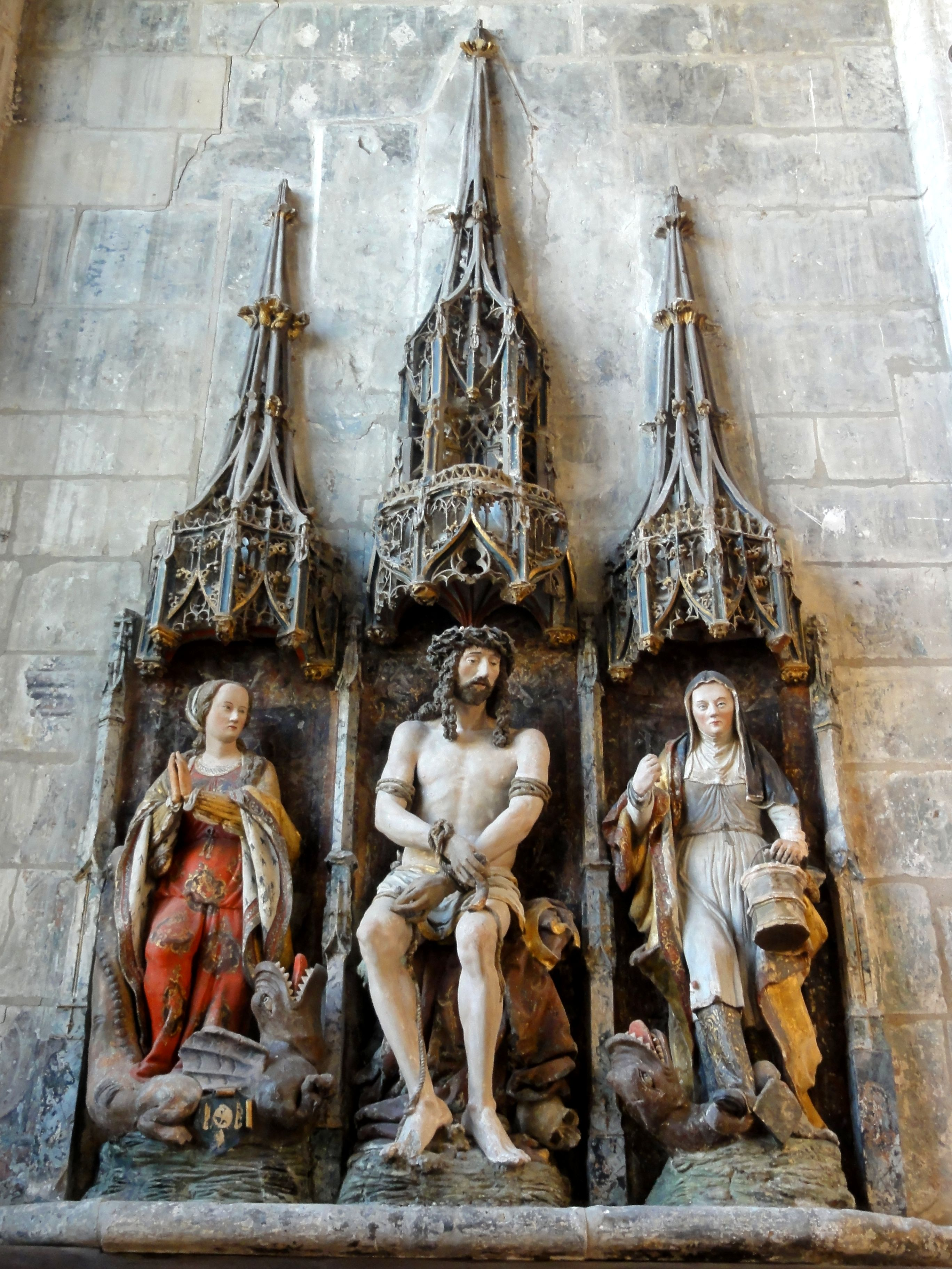 Retable de sainte Marthe, XVIe s.